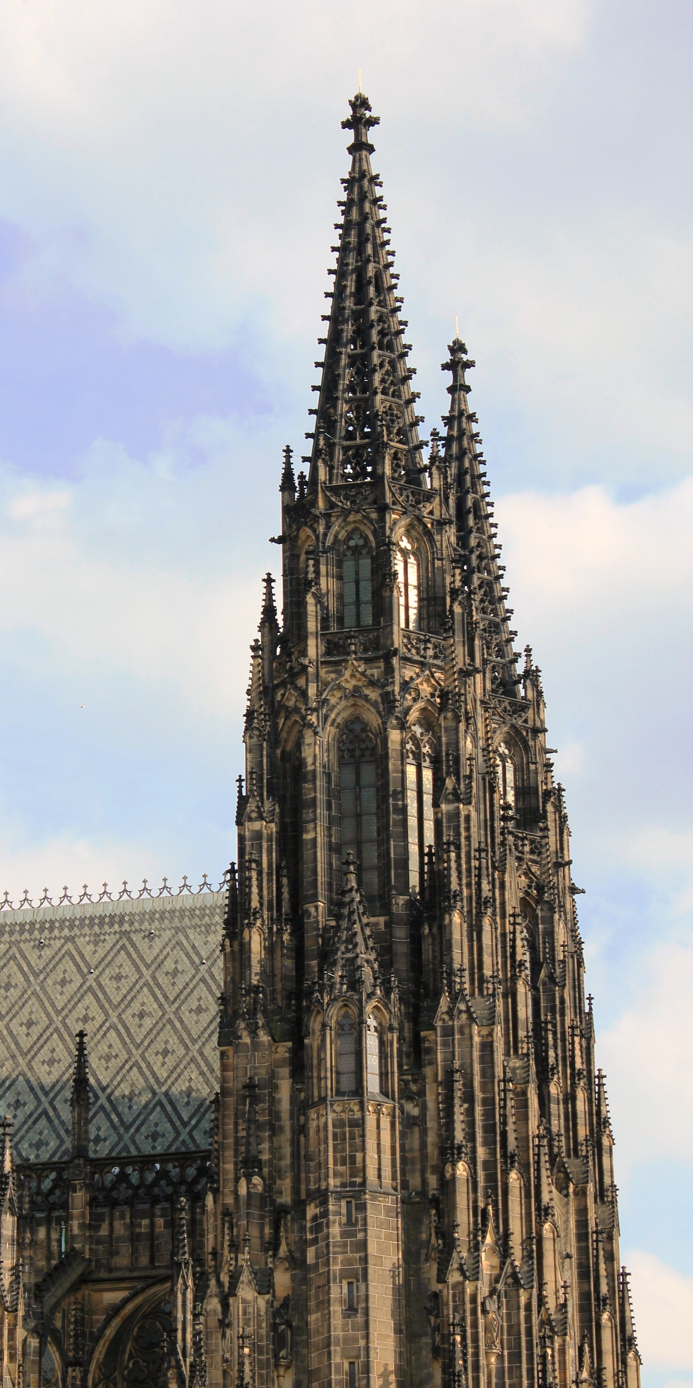 tower St. Vitus - Cathedral